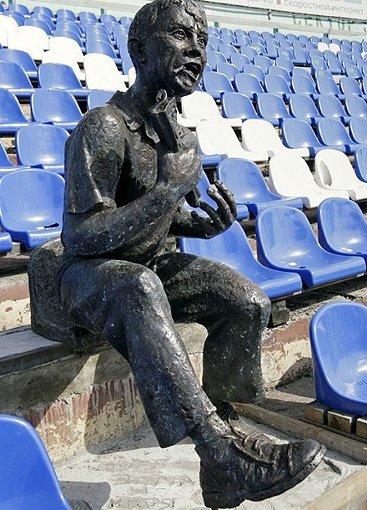 Памятник Болельщику.